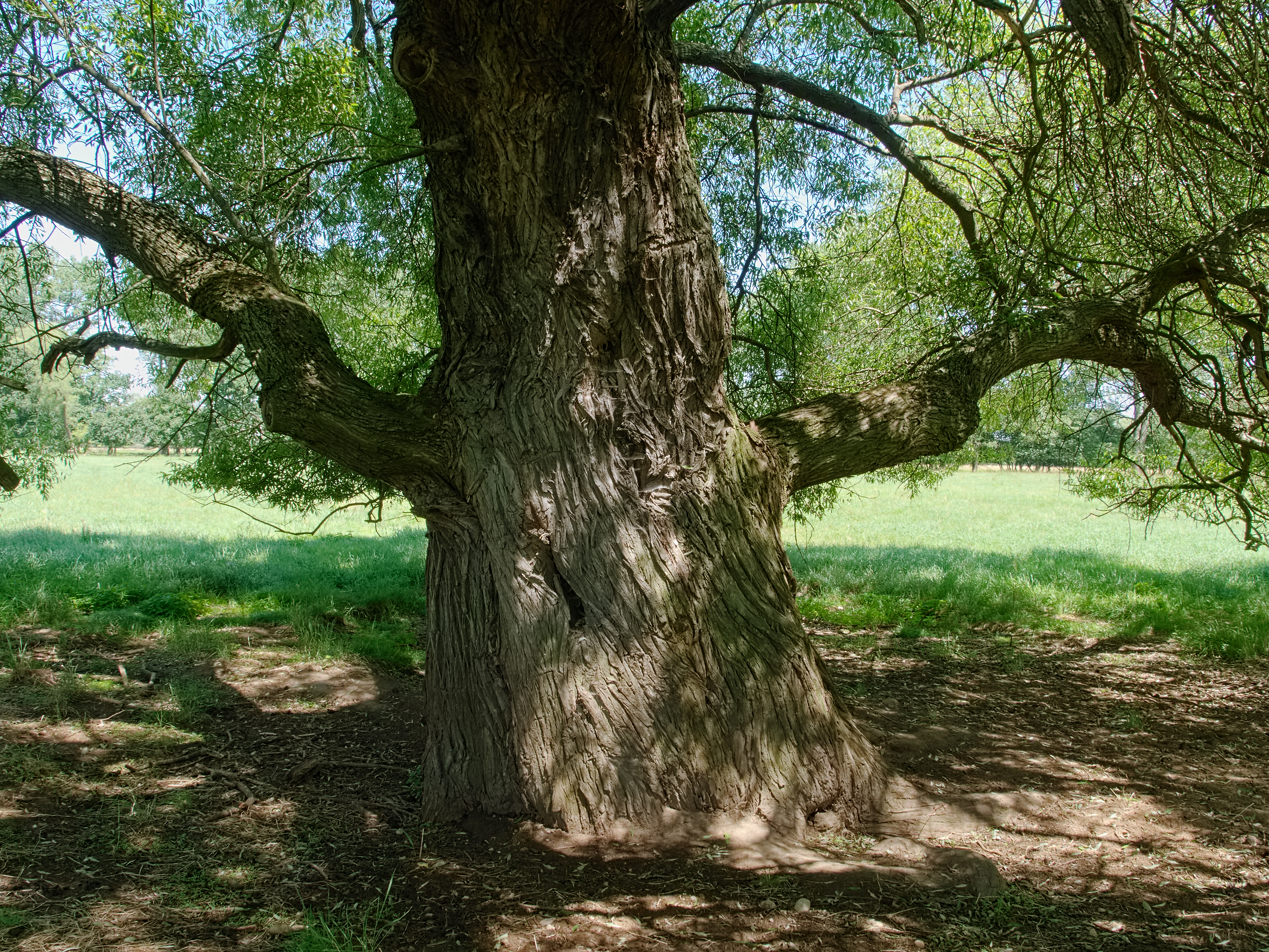 Bruch-Weide oder Knack-Weide - Salix fragilis. Aufgenommen an der Mulde in Eilenburg, Sachsen, Deutschland.